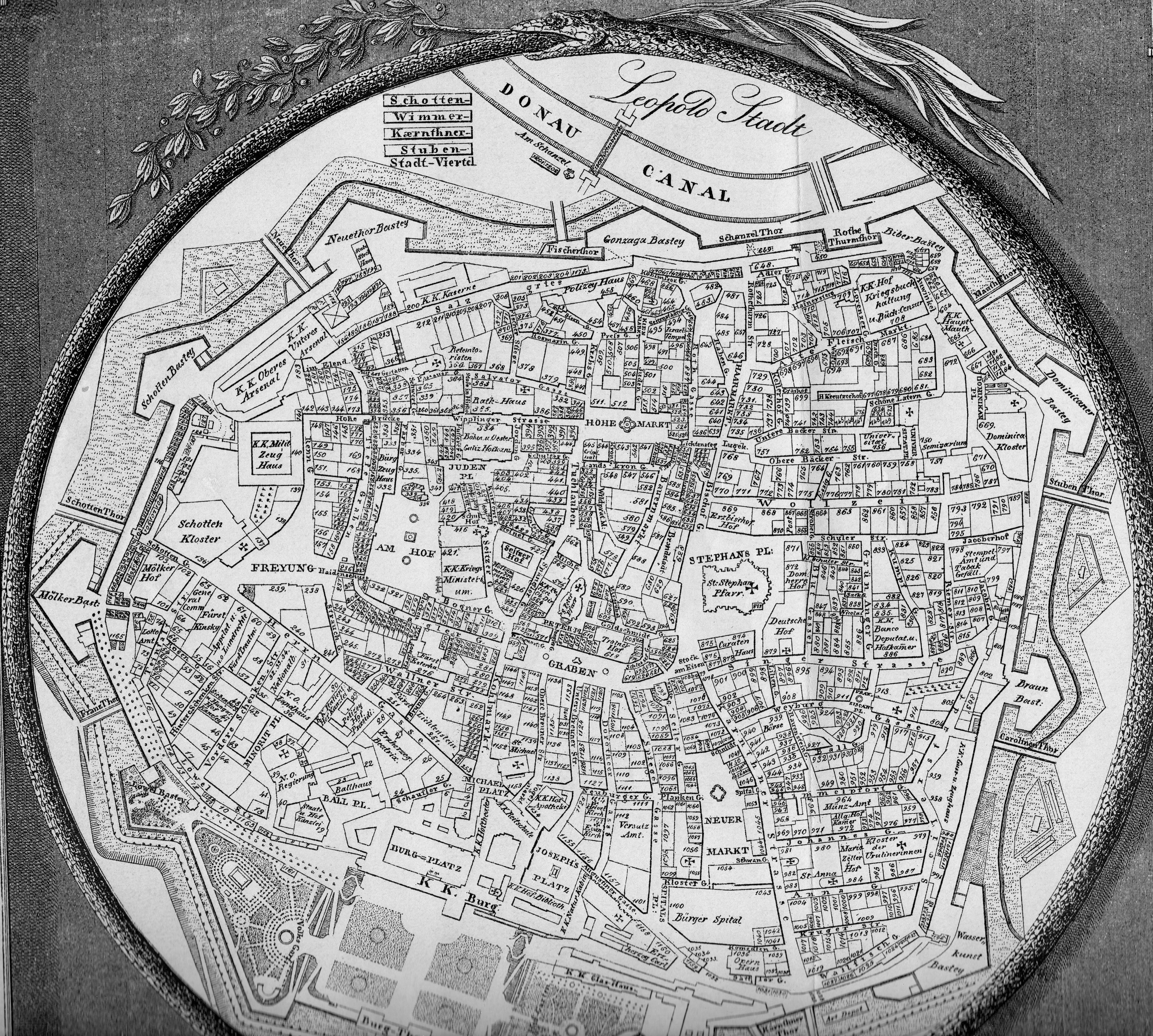 Plan der Wiener Inneren Stadt, Stand vor 1854 (Bau der Franz-Joseph-Kaserne) Er weist viel Ähnlichkeit mit Vasquez aus 1830 auf.